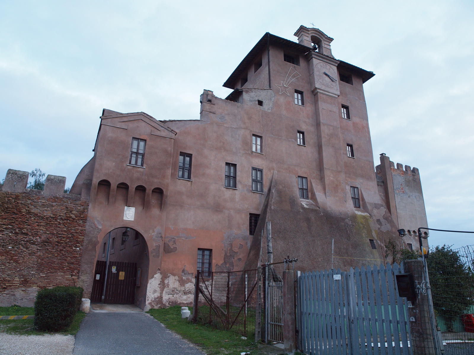 orologio a sei ore